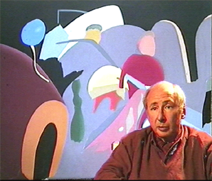 Portrait de Michel Tyszblat